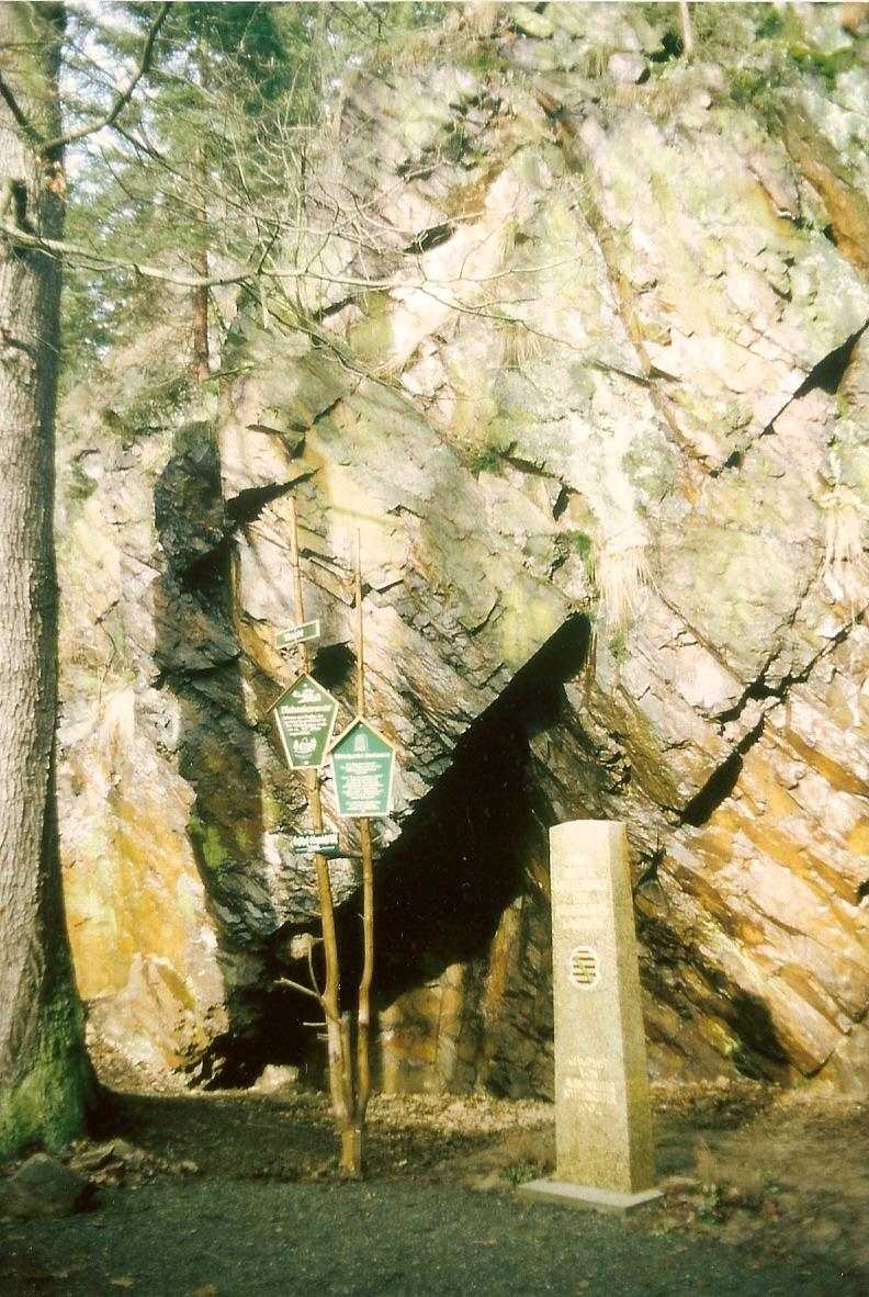 Mittelpunktstele im Tharandter Wald